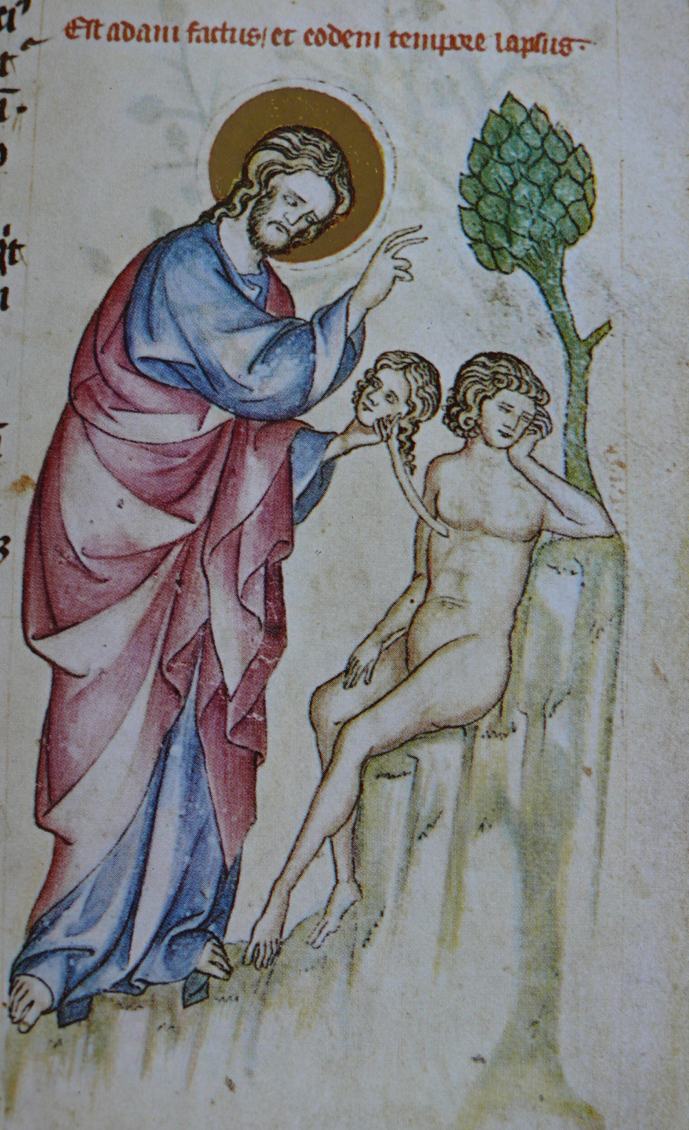 Stvoření Evy